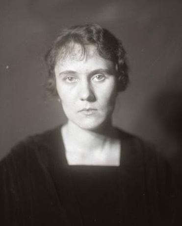 Anděla Kozáková-Jírová (1897 - 1986), Český právnička.